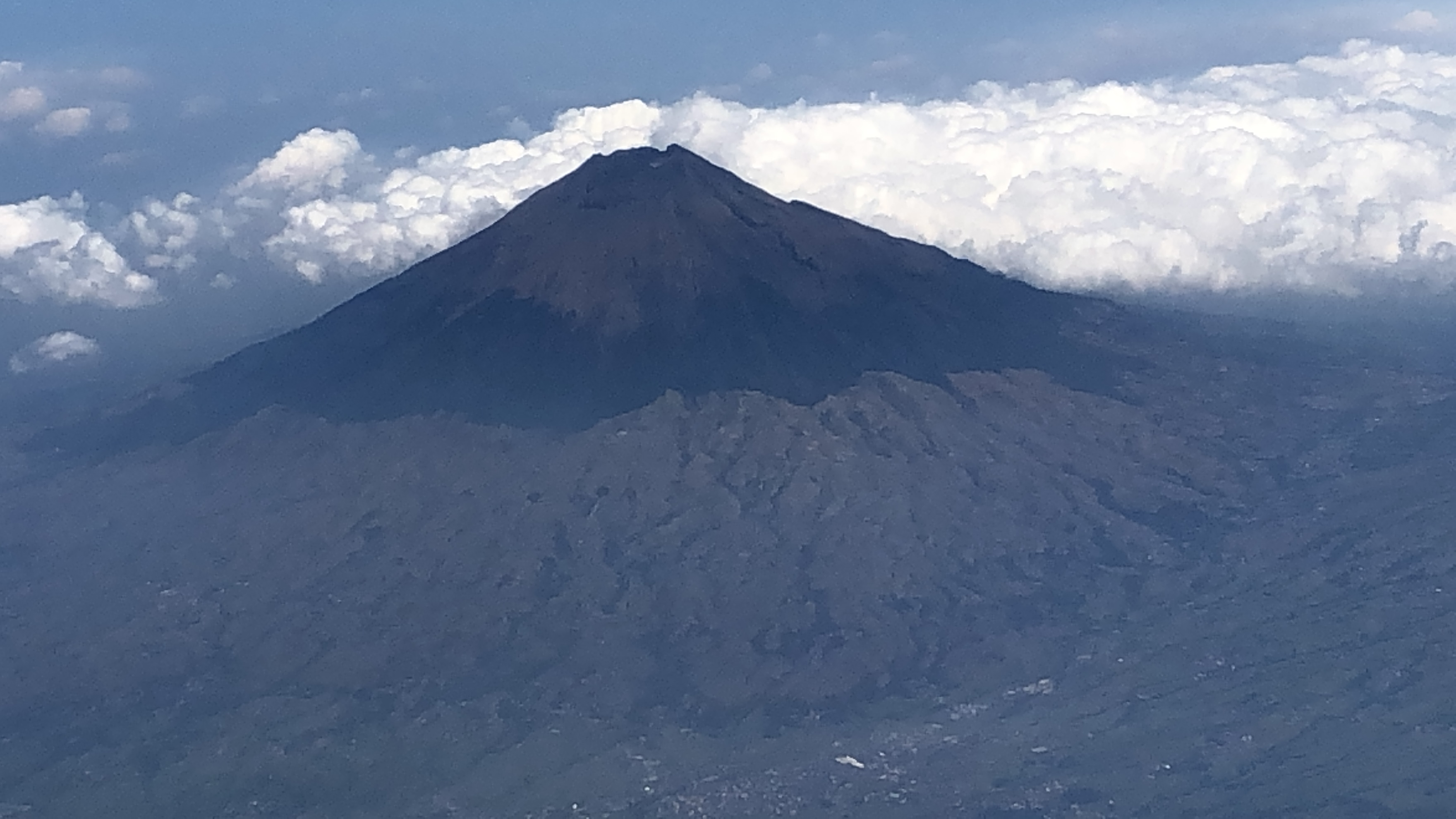 Gunung Sumbing Merupakan gunung berapi di Provinsi Jawa Tengah yang terletak diantara kabupaten Temanggung, Wonosobo, Magelang tidak ada tanda-tanda meletus namun bisa saja suatu saat aktif letusan terakhir diperkirakan tahun 1730